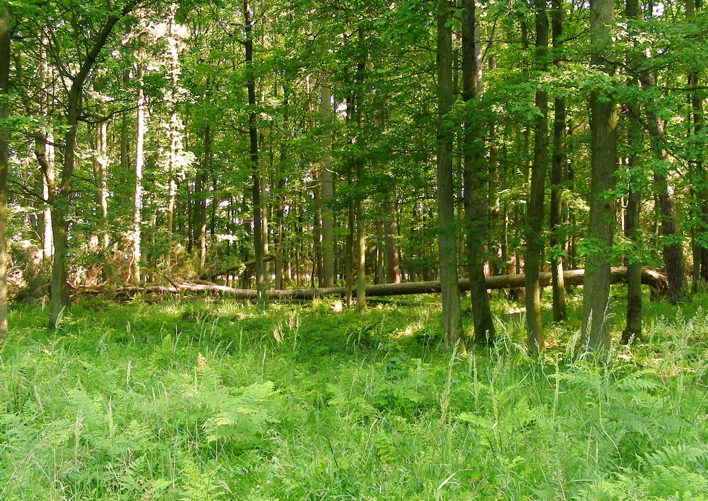 Rezerwat przyrody Jaśkowice, gmina Prószków, województwo Opolskie, Polska